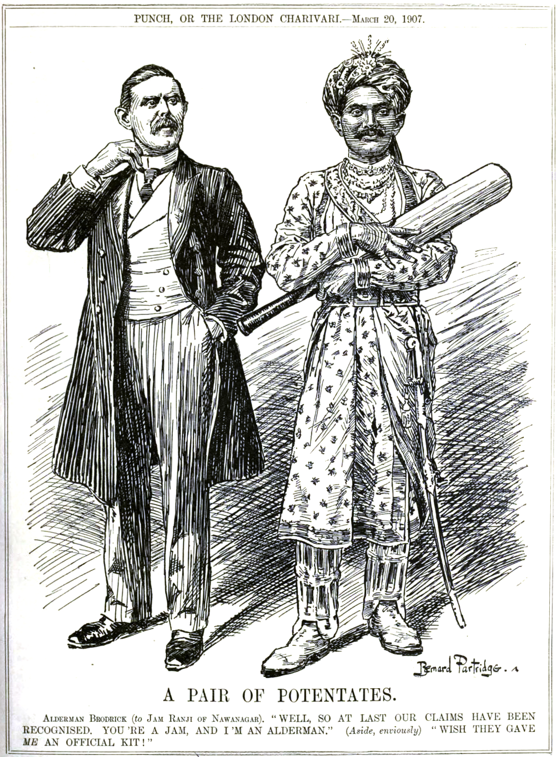 Ranjitsinhji (10 September 1872 – 2 April 1933)